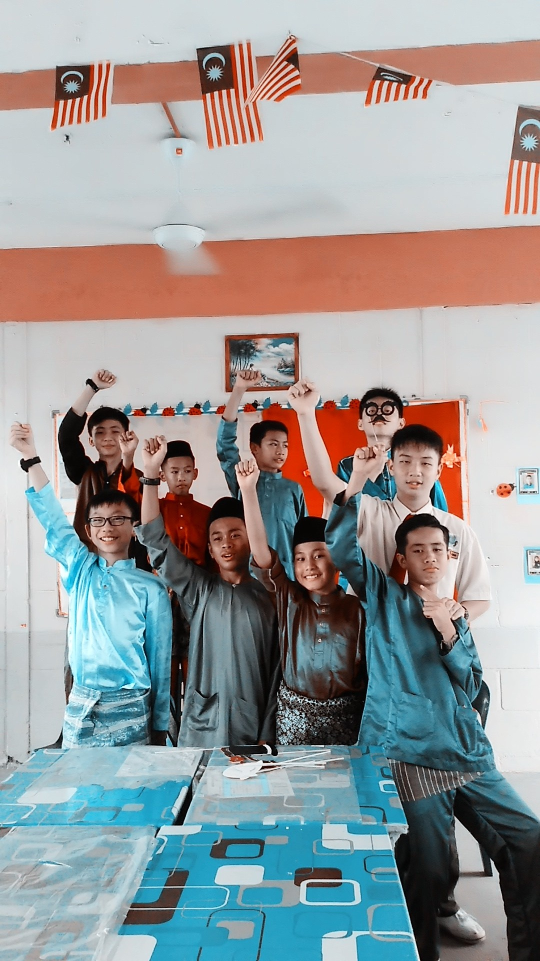 Anak-anak merdeka